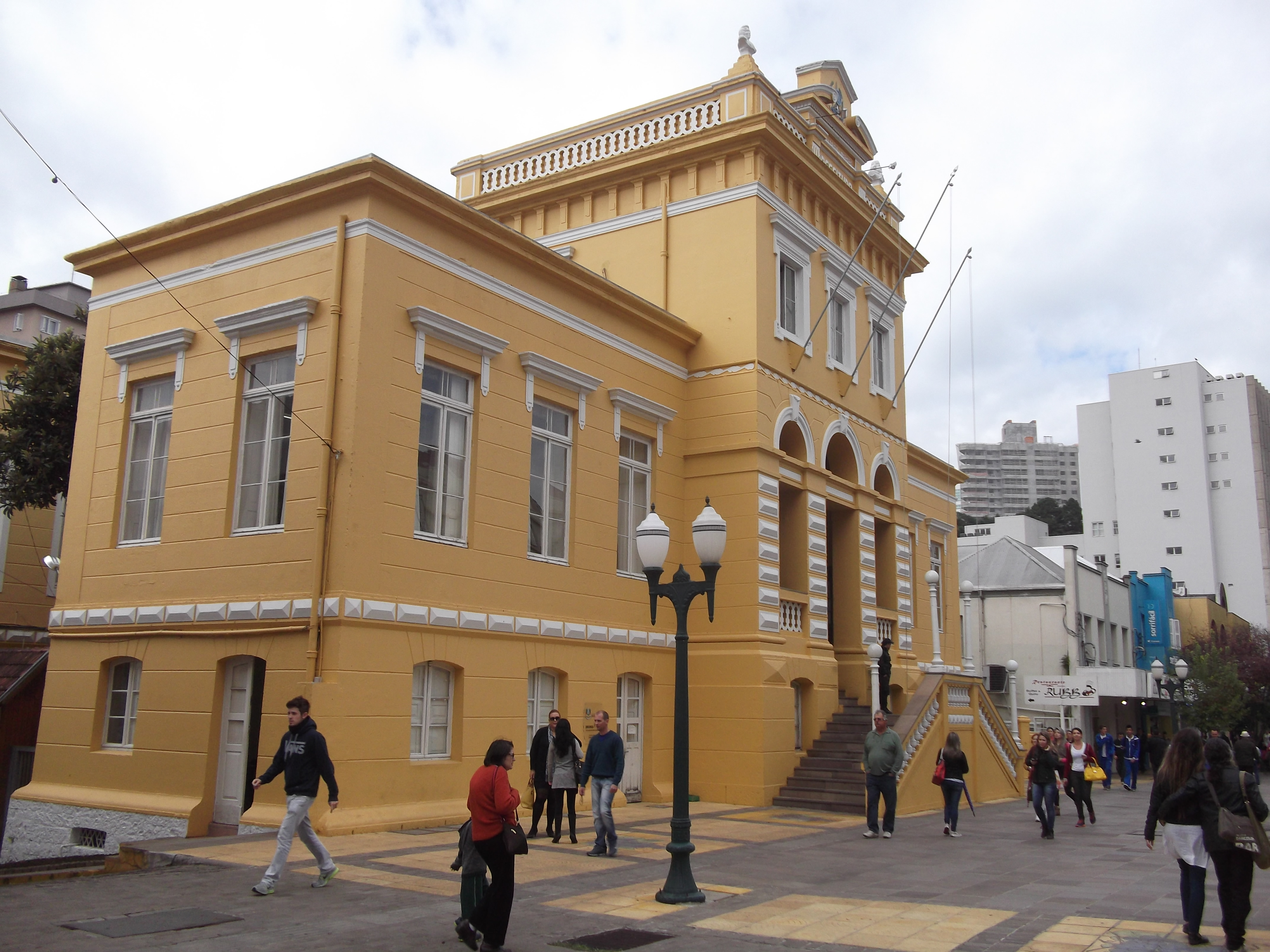 Bento Gonçalves 2015-04-30